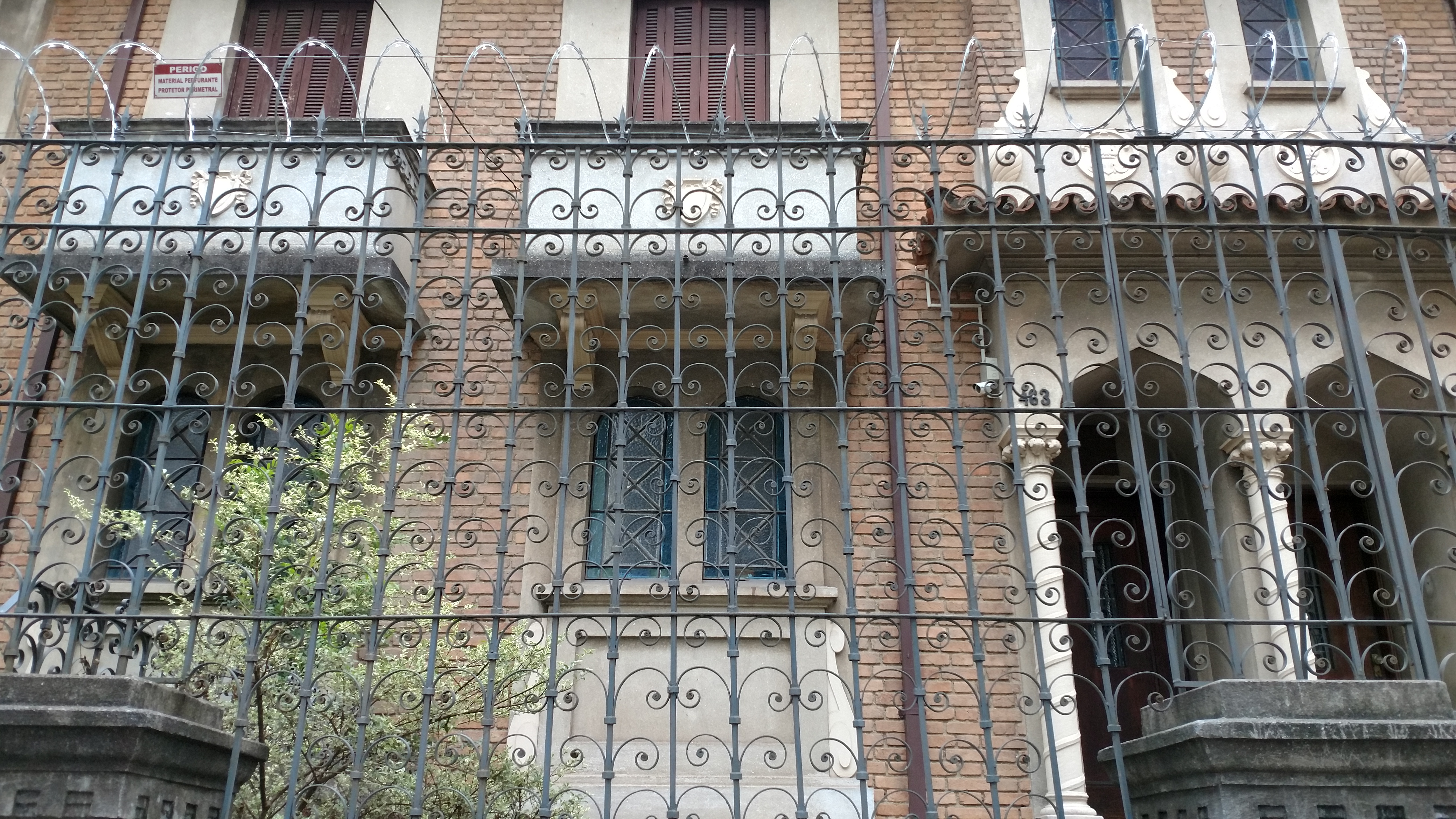 Fachada do Parque Residencial Savóia, com destaque para a casa situada na Rua Vitórino Carmilo, 463, em São Paulo (SP)